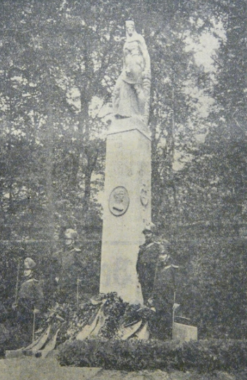 Feierlichkeiten am 125.Todestag Theodor Körners in der Ulmenallee, Fischertal in Wuppertal-Barmen, 1938. Das Denkmal wurde von Carl Moritz Schreiner gefertigt.